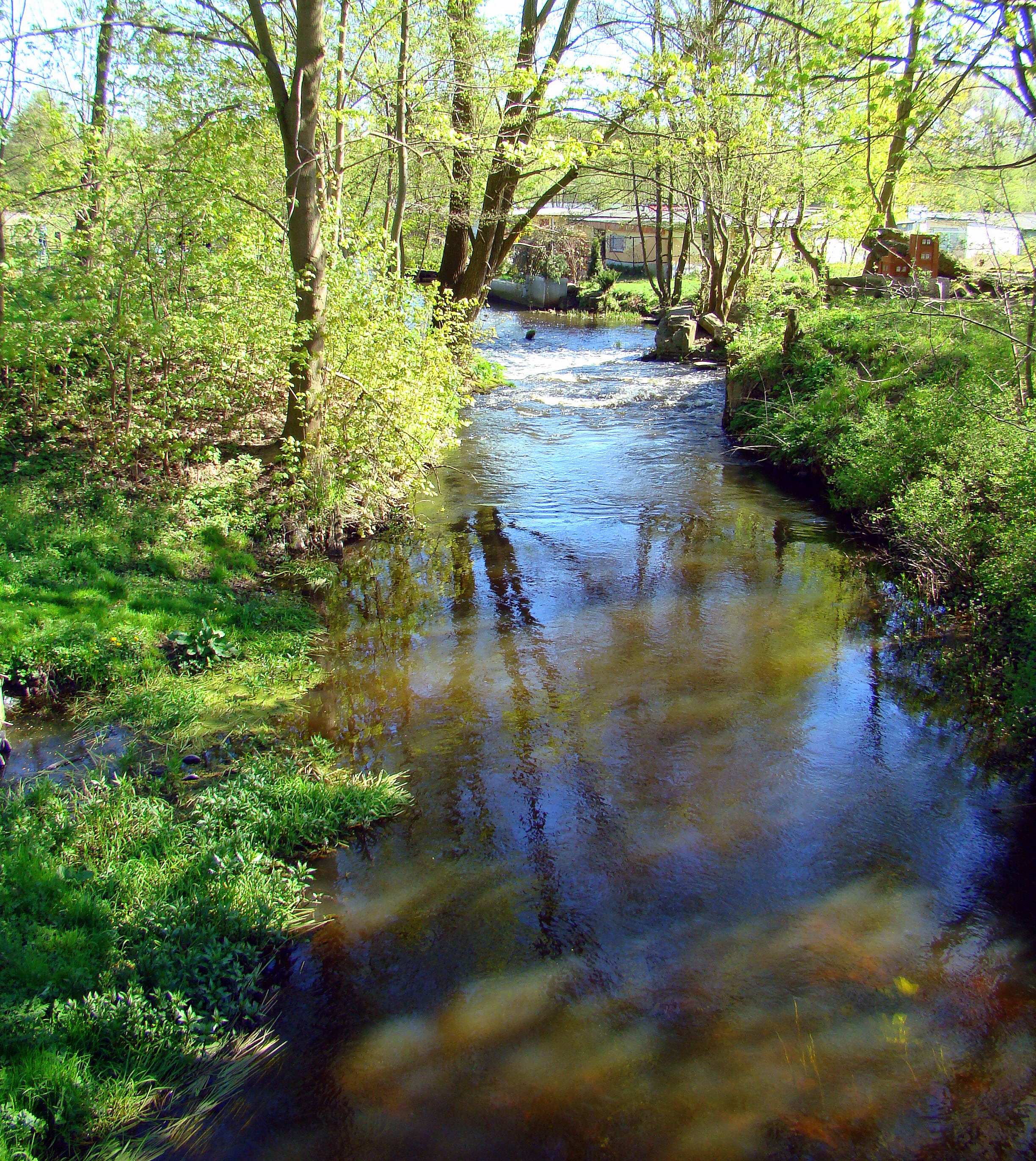 Rzeka Gunica w Jasienicy, (Police, Województwo zachodniopomorskie), Polska